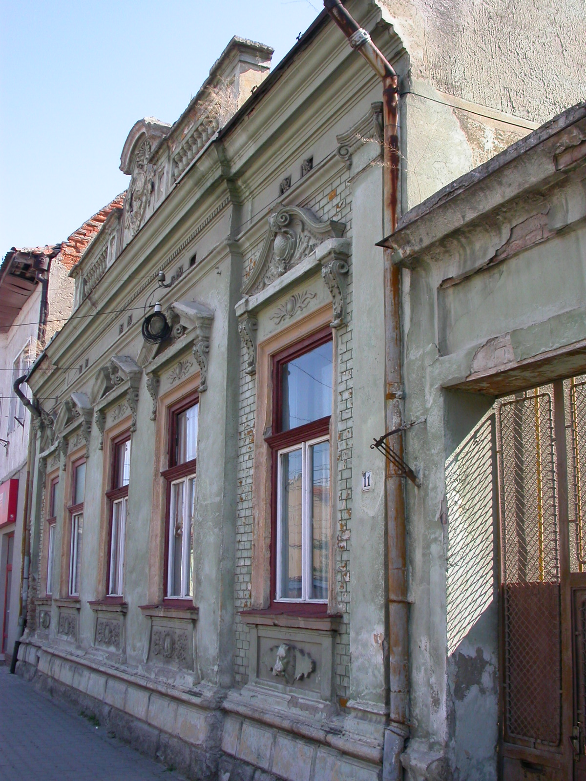 Casă, sf. sec. XIX